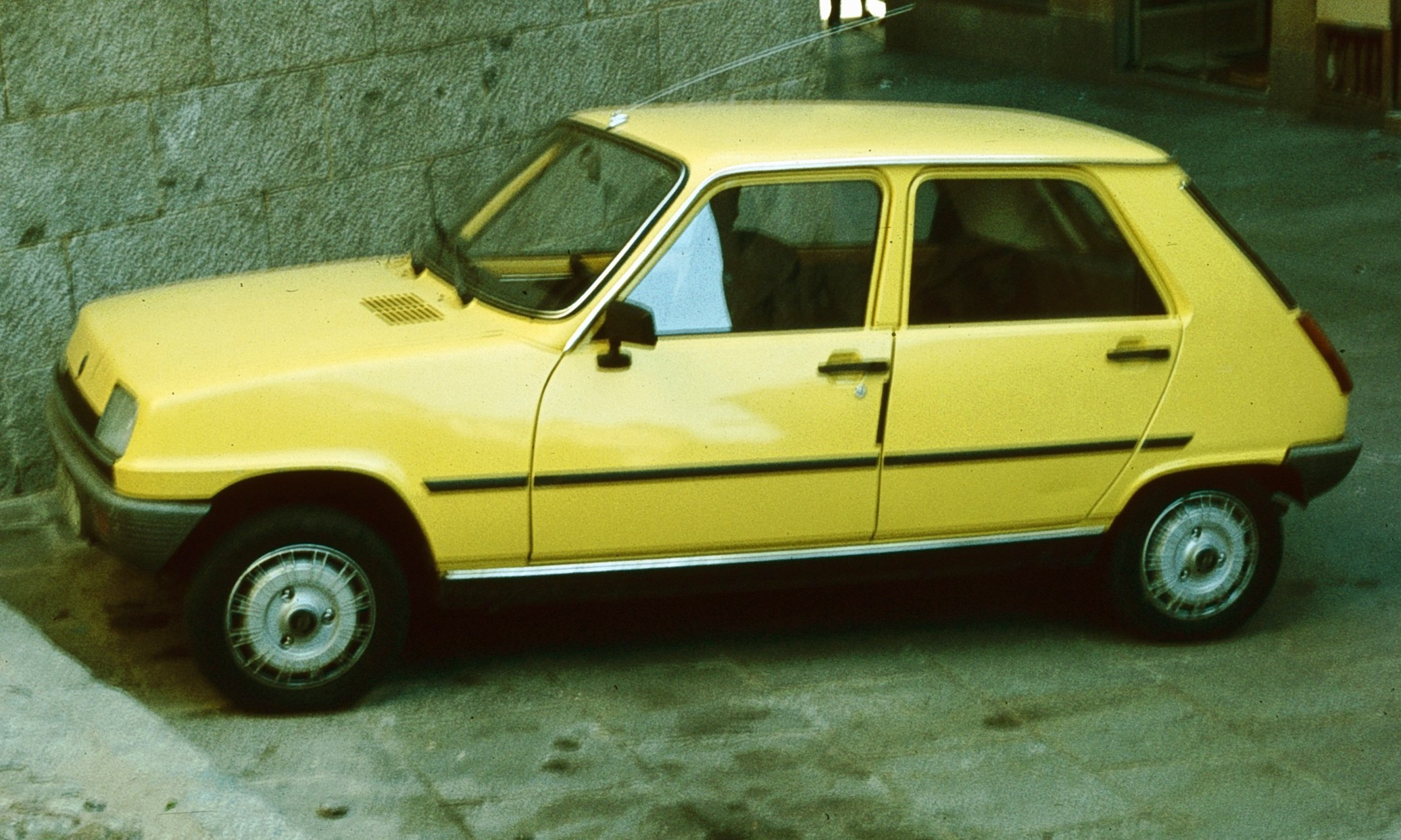 Renault 5 1ere version aux 5 portes